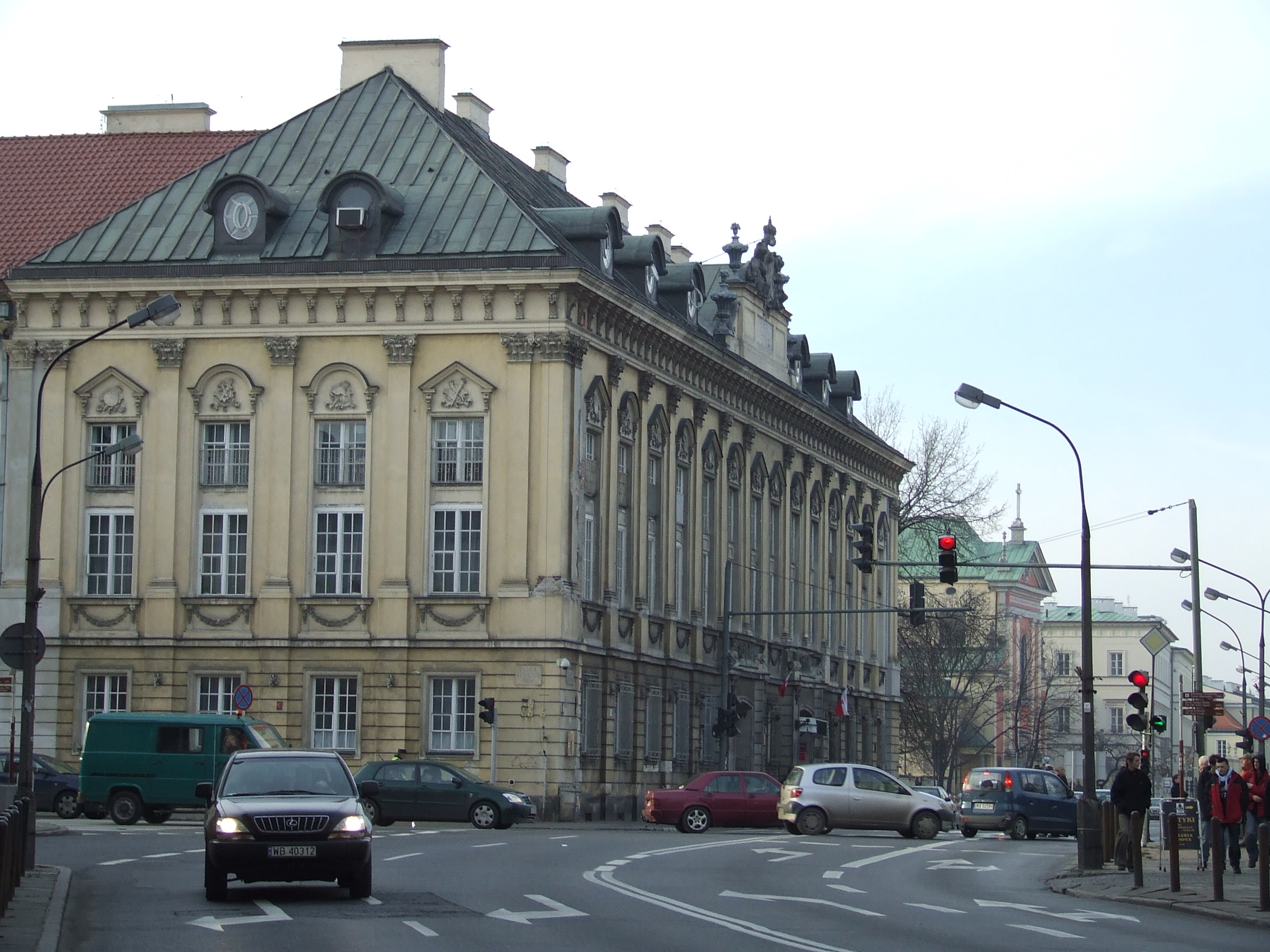 Pałac biskupów krakowskich, Warszawa, ul. Miodowa